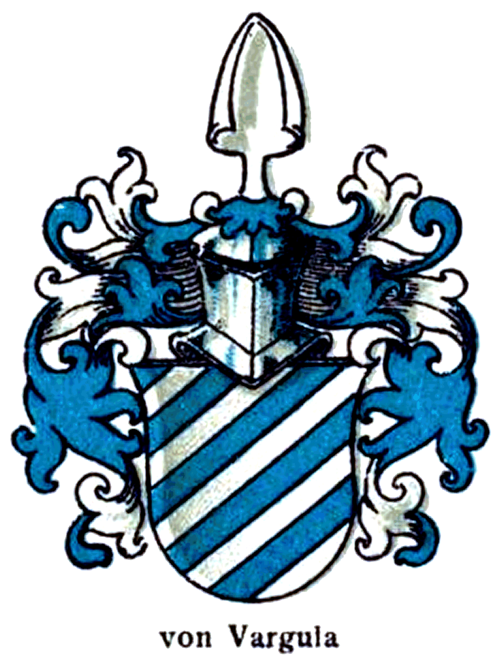 Wappen derer von VargulaPerglas